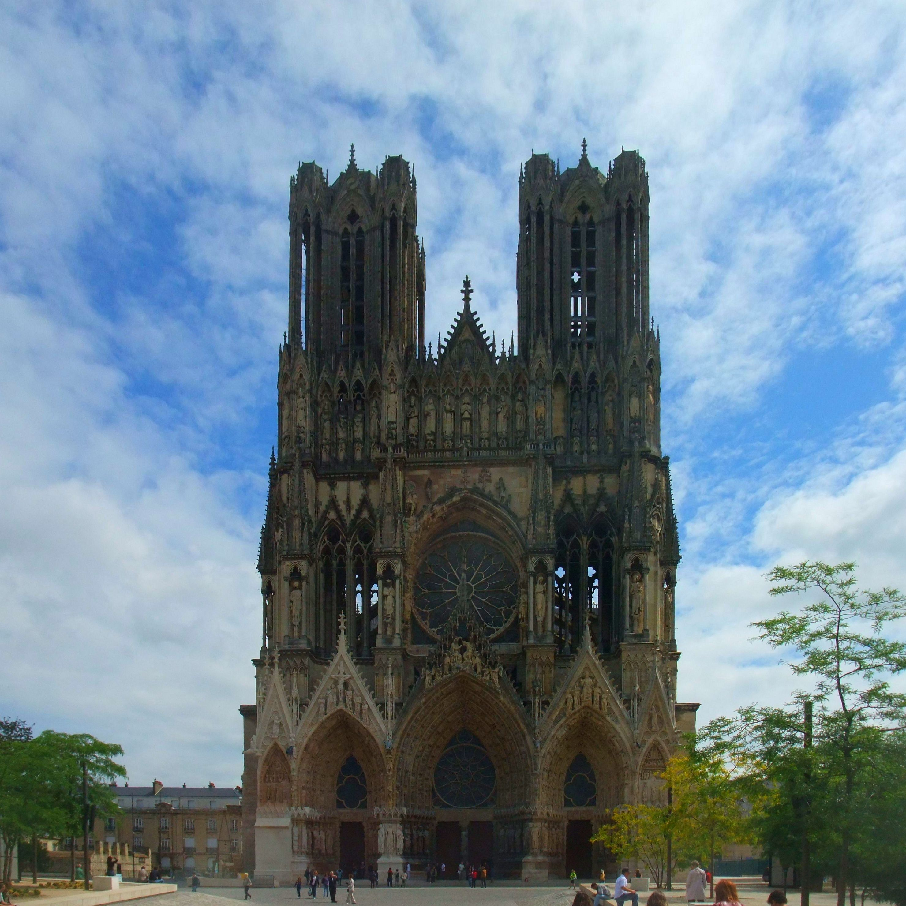 Reims, Kathedrale